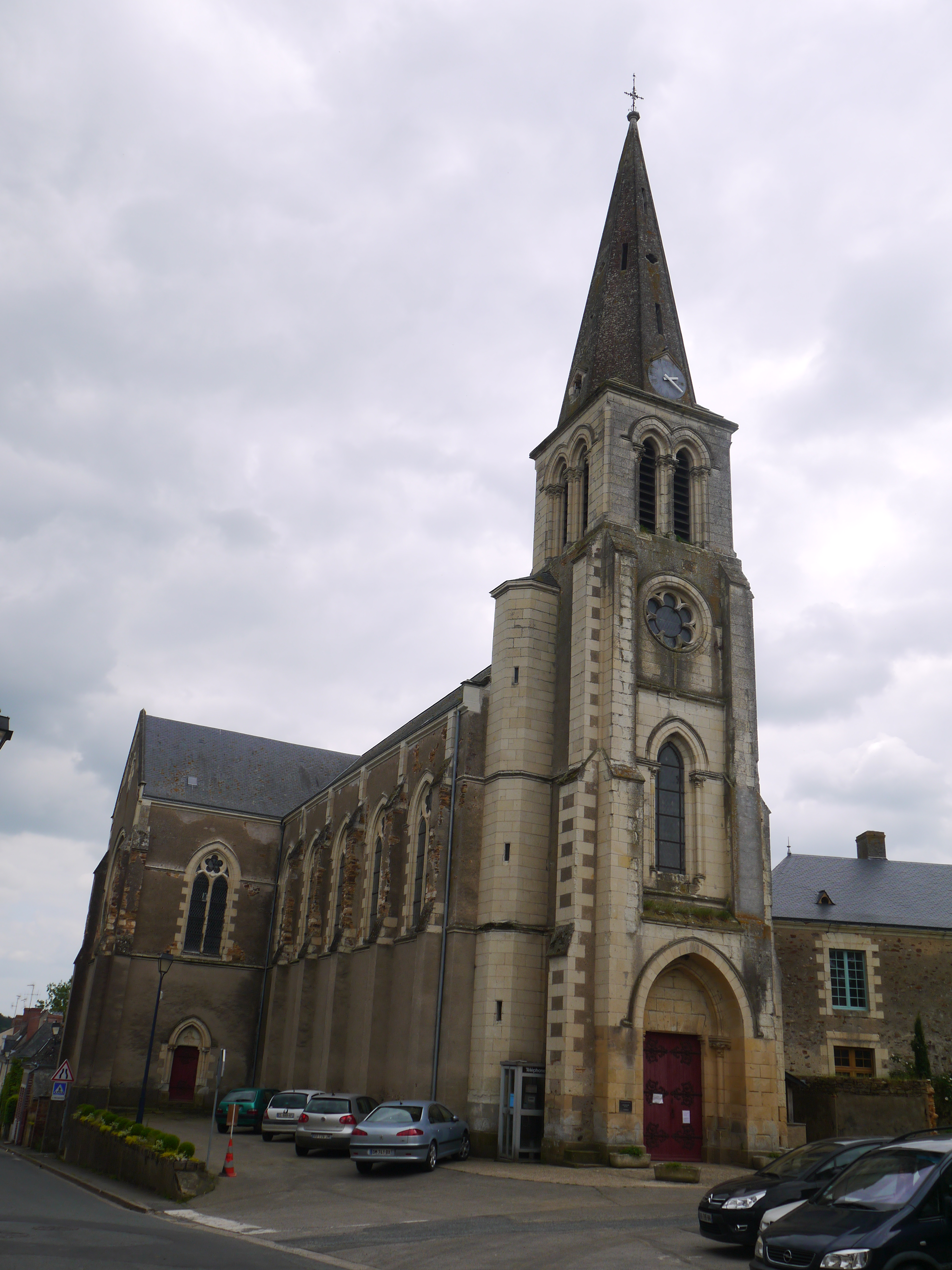 L'église Saint-Aubin à Chambellay (Maine-et-Loire, France).